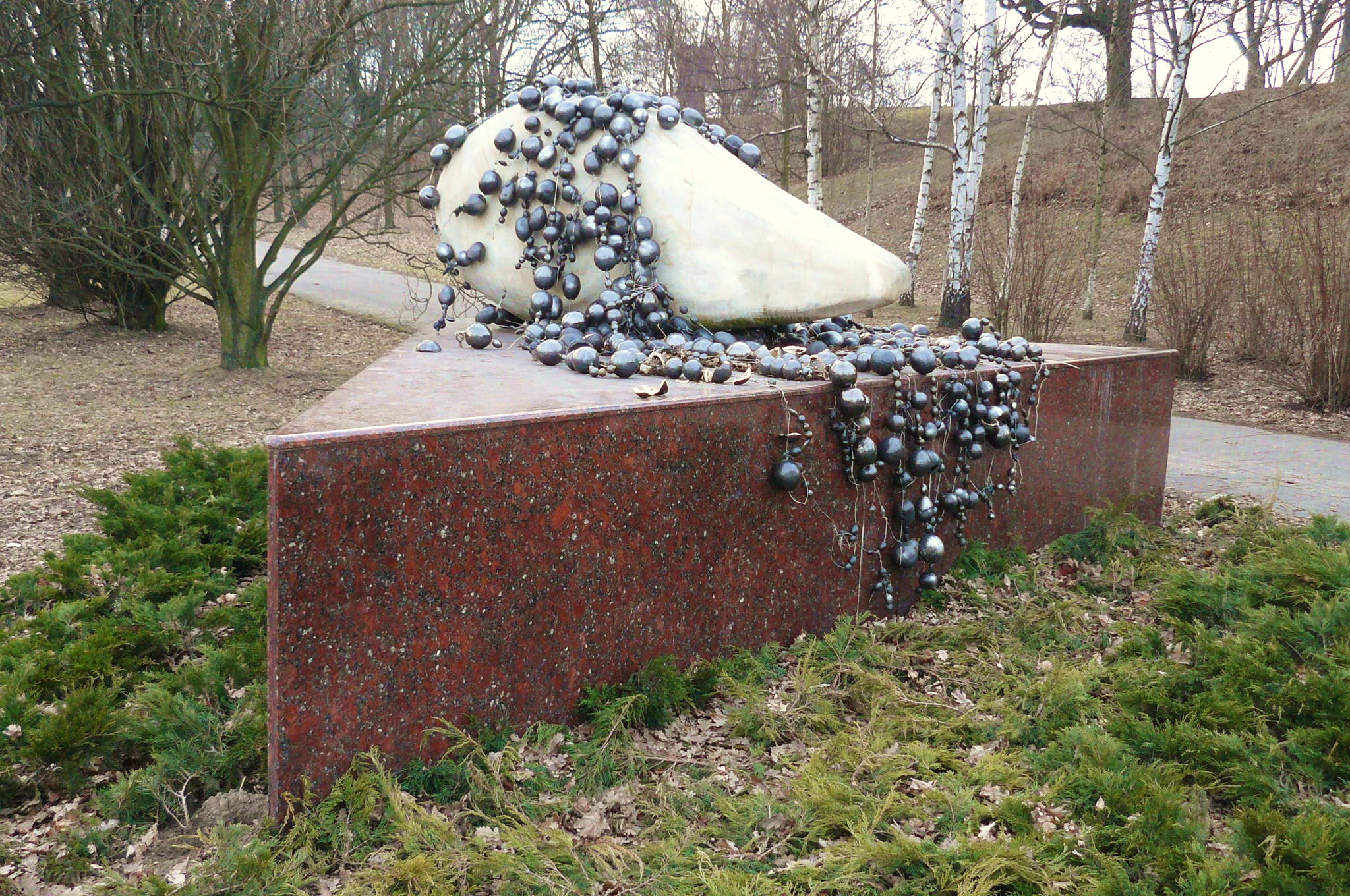 Ziarno - Epitafium Życia. Poznań, Cytadela. Proj. Andrzej Banachowicz. 2009.